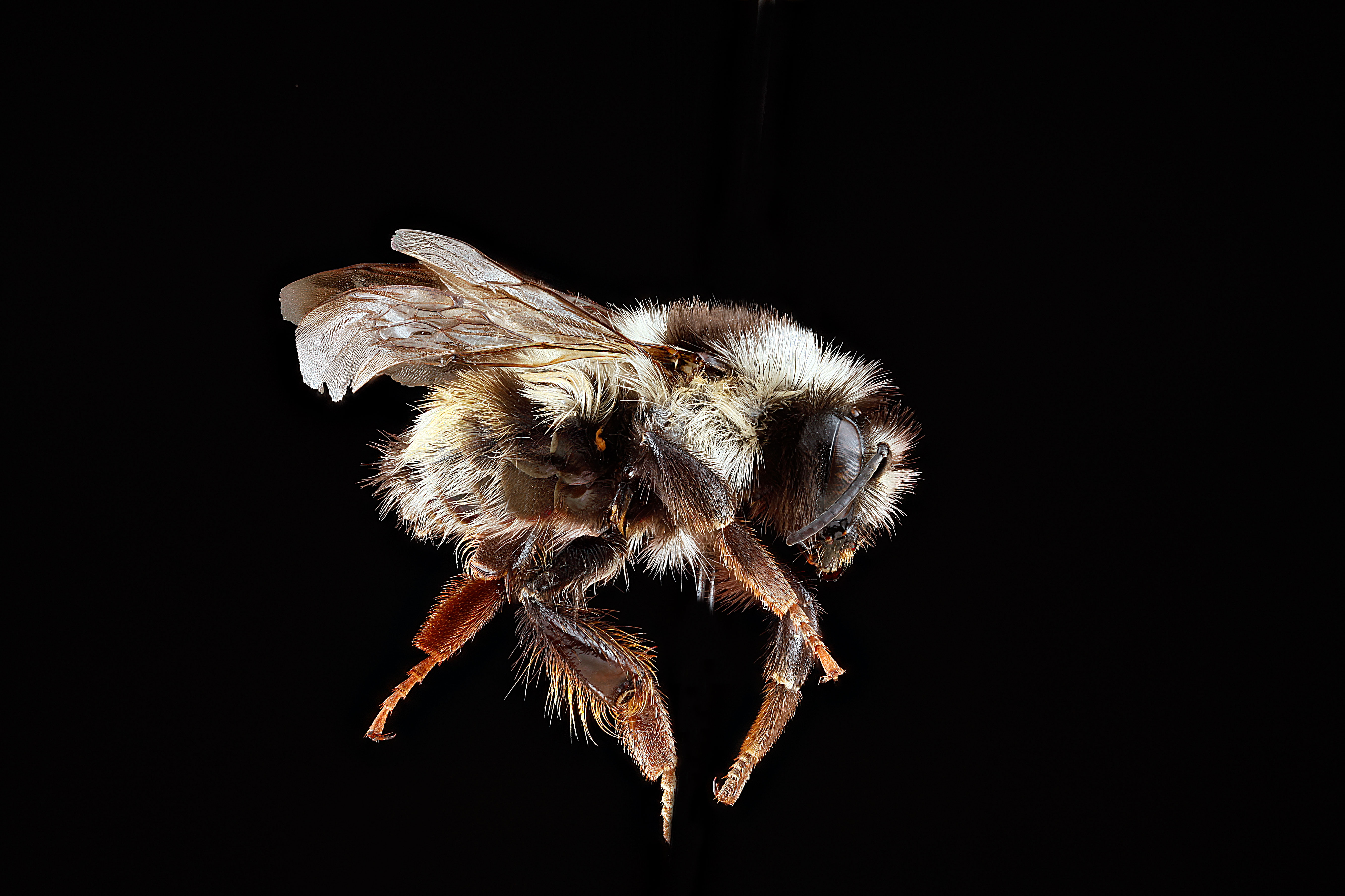 Bombus bifarius, female